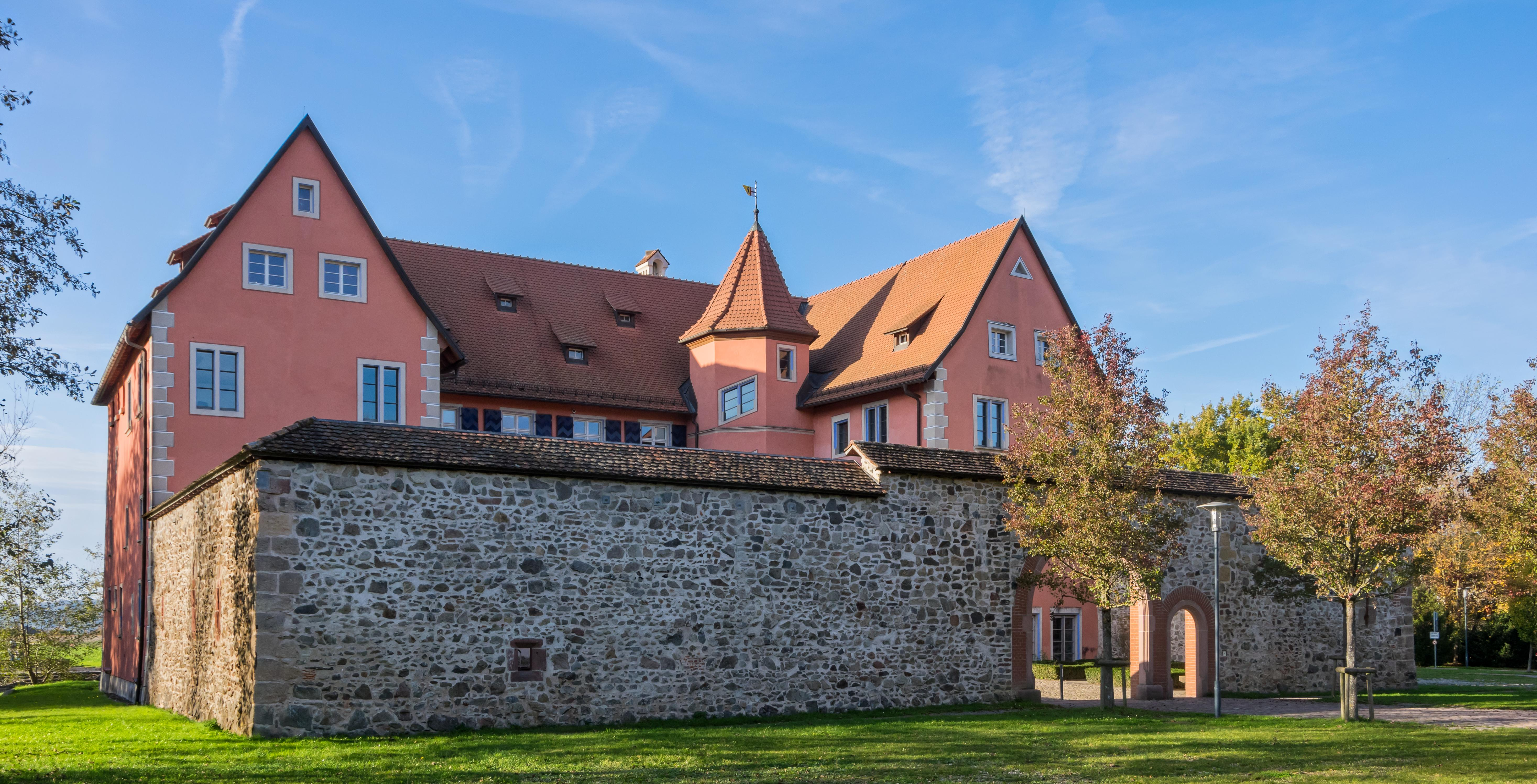 Bilder aus Kirchzarten Talvogtei